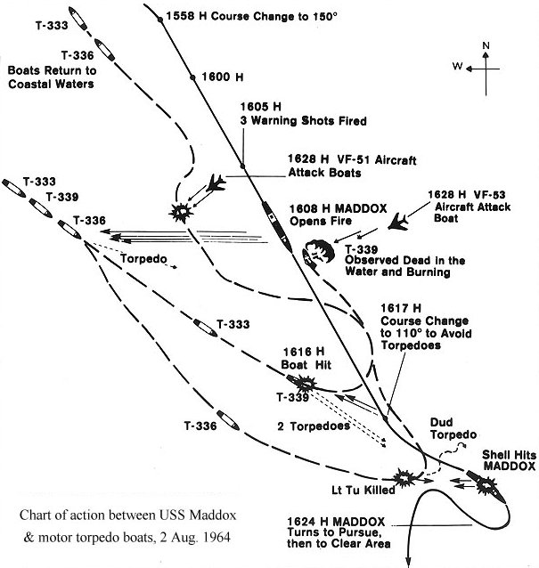 Tonkin-Zwischenfall 2. August 1964